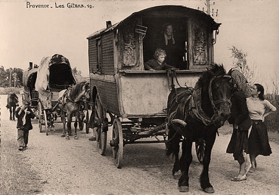 Verdines de gitans sur la route des Saintes-Maries-de-la-Mer